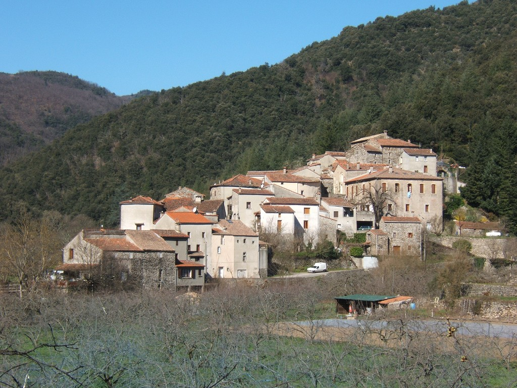 Hameau de L'Arboux, commune de Mandagout, Gard, France